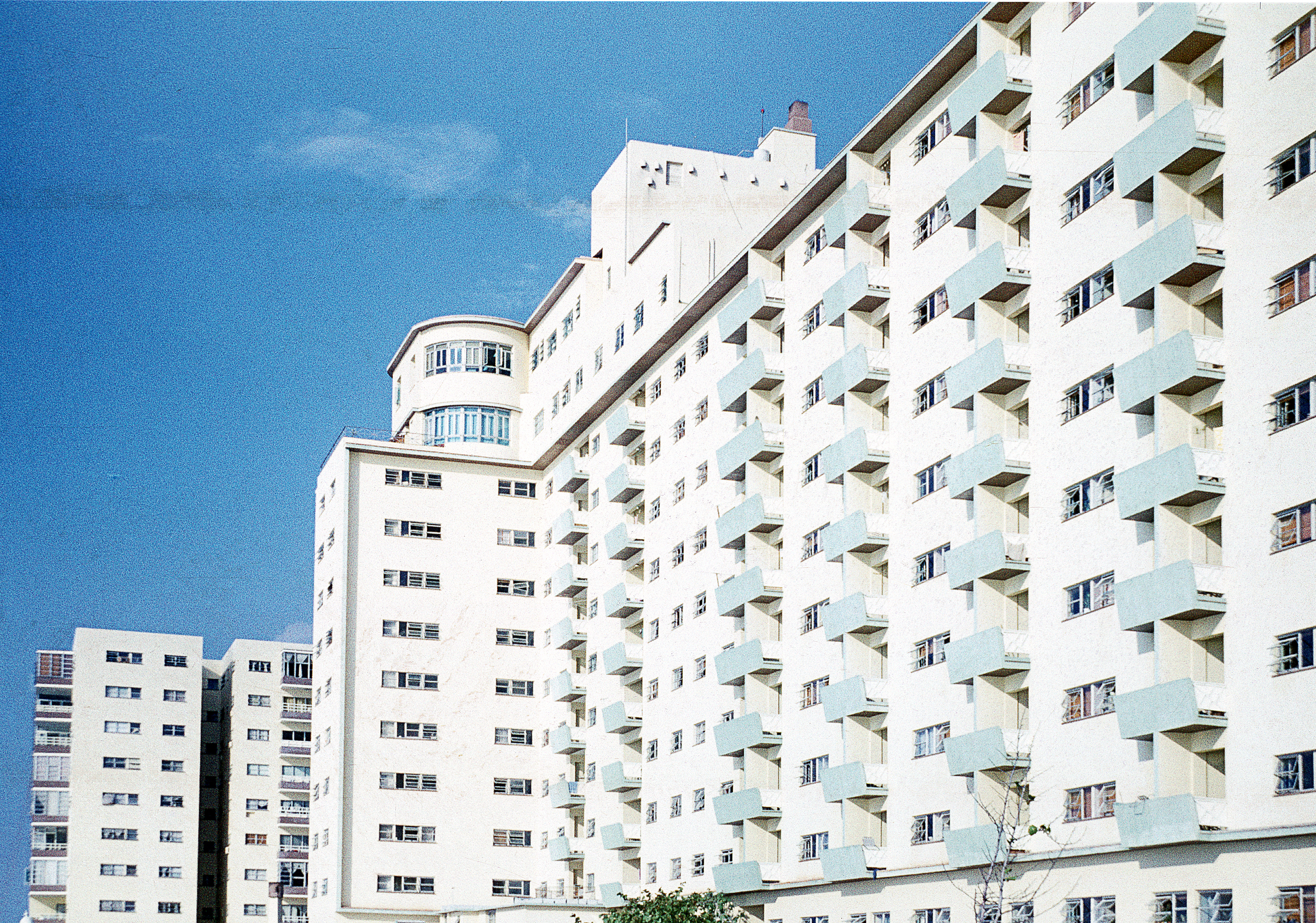 Havanna 1973; Dia-Scans; Hotel Sierra Maestra und Rio Mar in Miramar Havana; heute Hotel Antiguo edificio Rosita de Ornedo